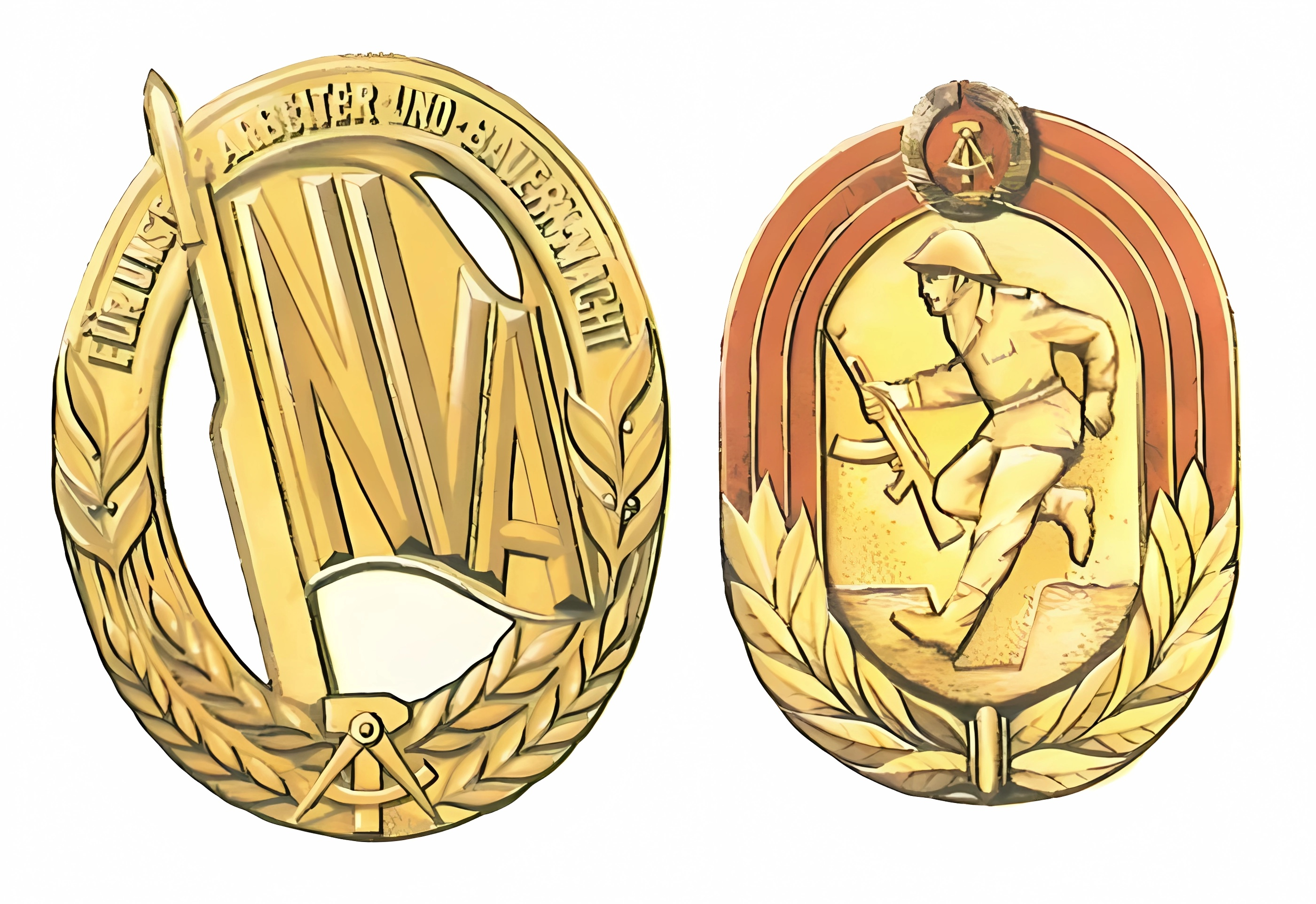 Militärsportabzeichen der NVA, rechts das nicht verliehene Musterstück